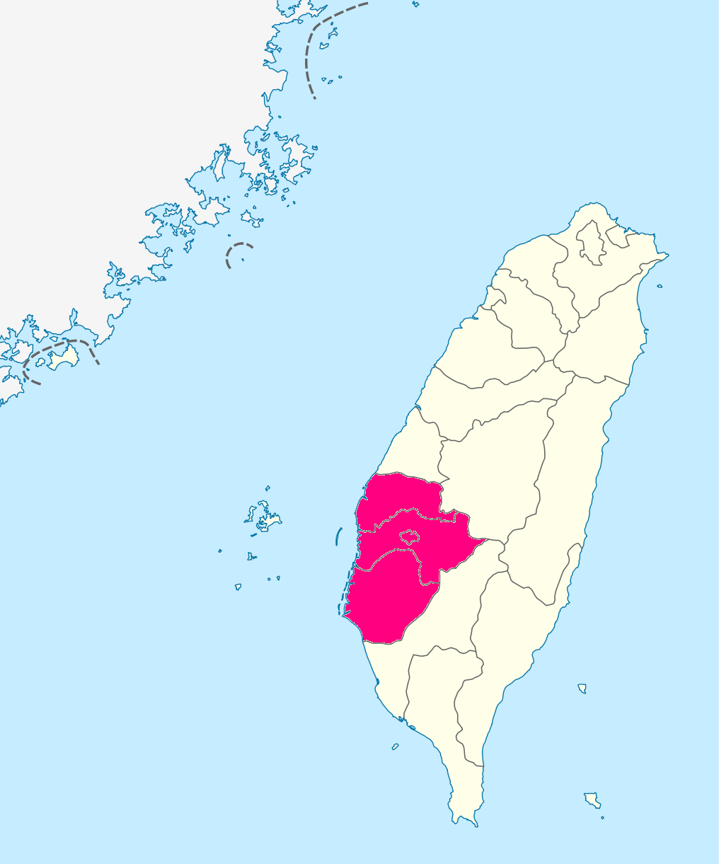 雲嘉南地區地圖。